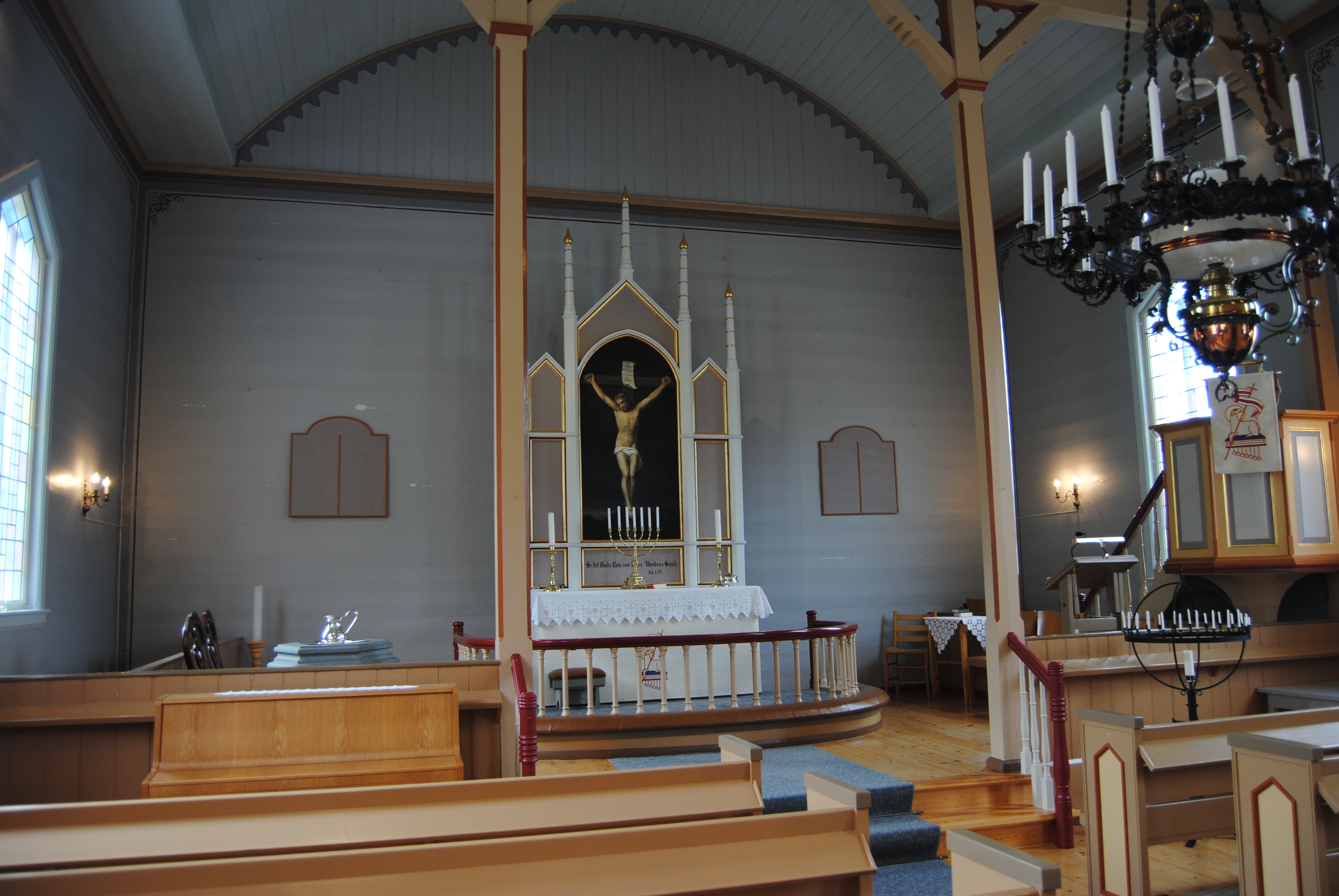 Koret i Vike kapell